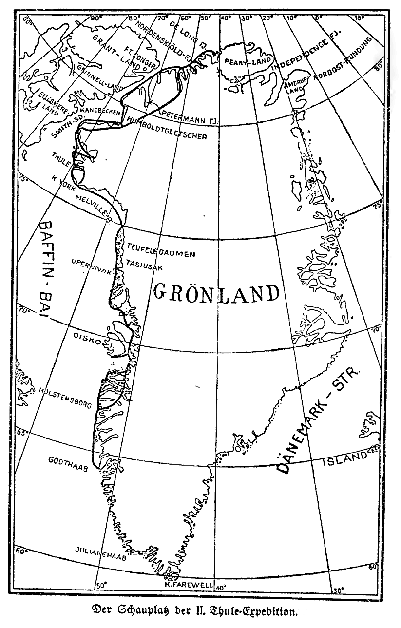 Route der 2. Thule-Expedition 1916 bis 1918.